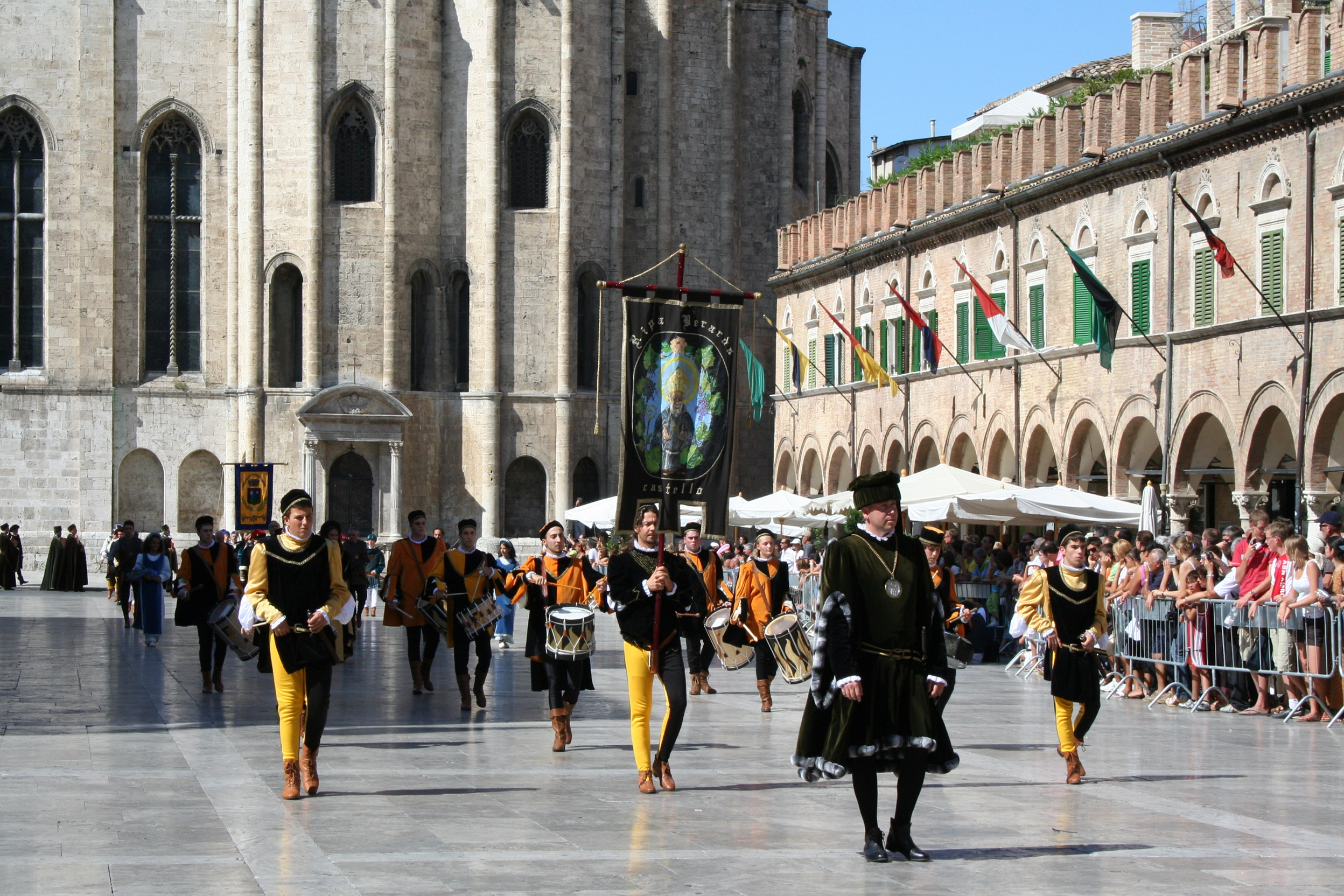 Gruppo di Ripaberarda, Quintana del 5 agosto 2007.